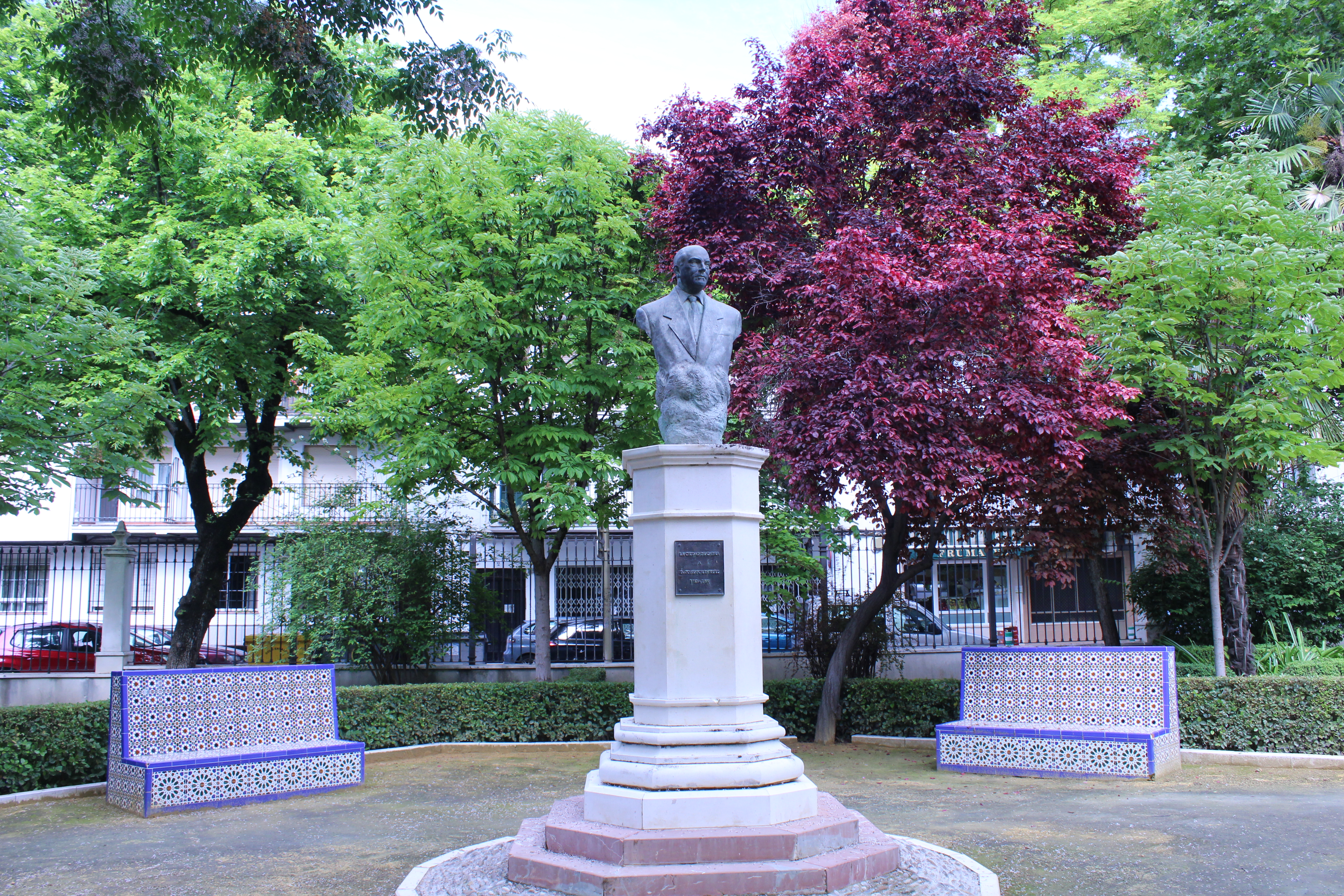 Monumento a José Solís Ruiz en el parque Alcántara Romero de su ciudad natal.